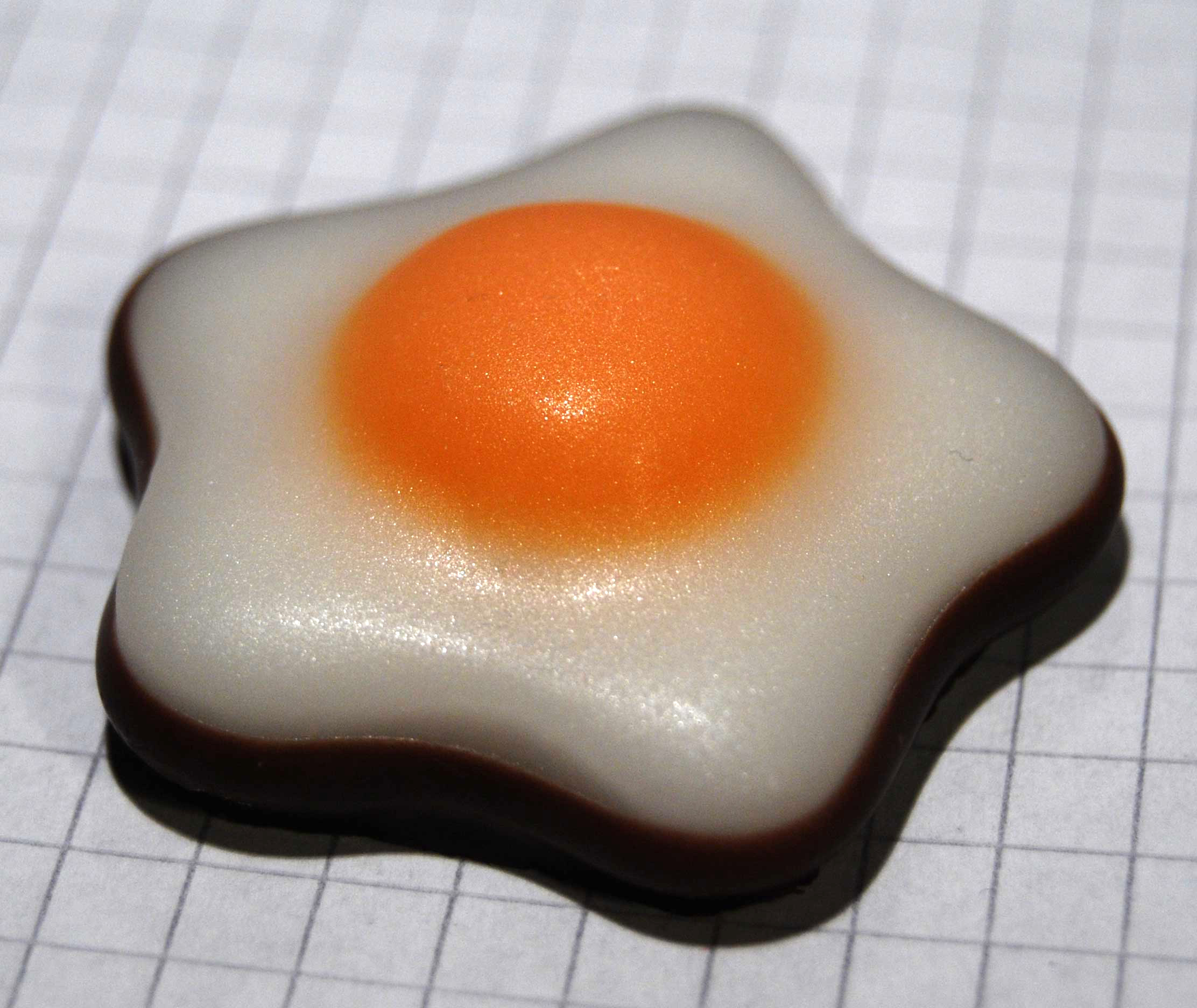 Fondantkonfekt